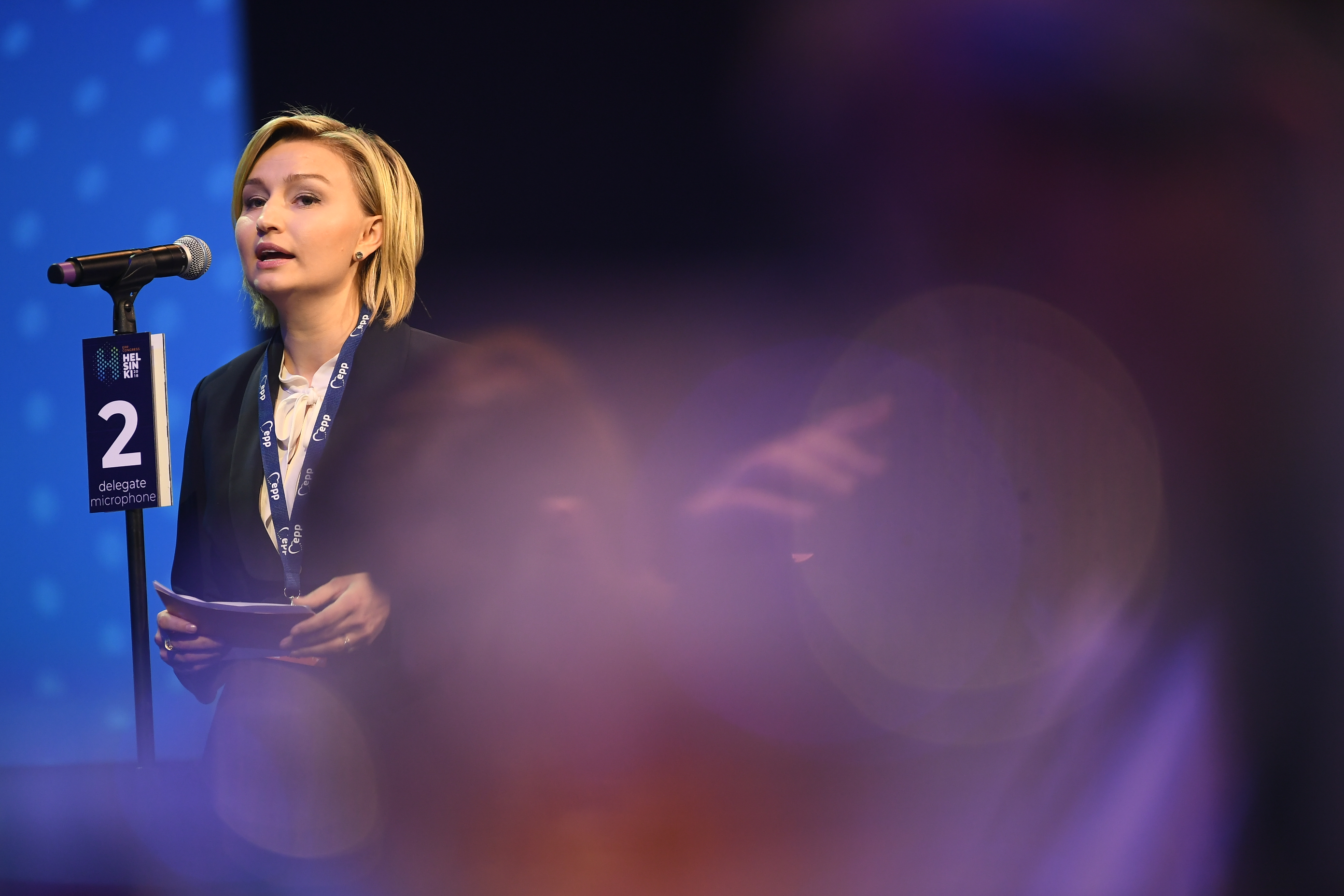 7 November 2018